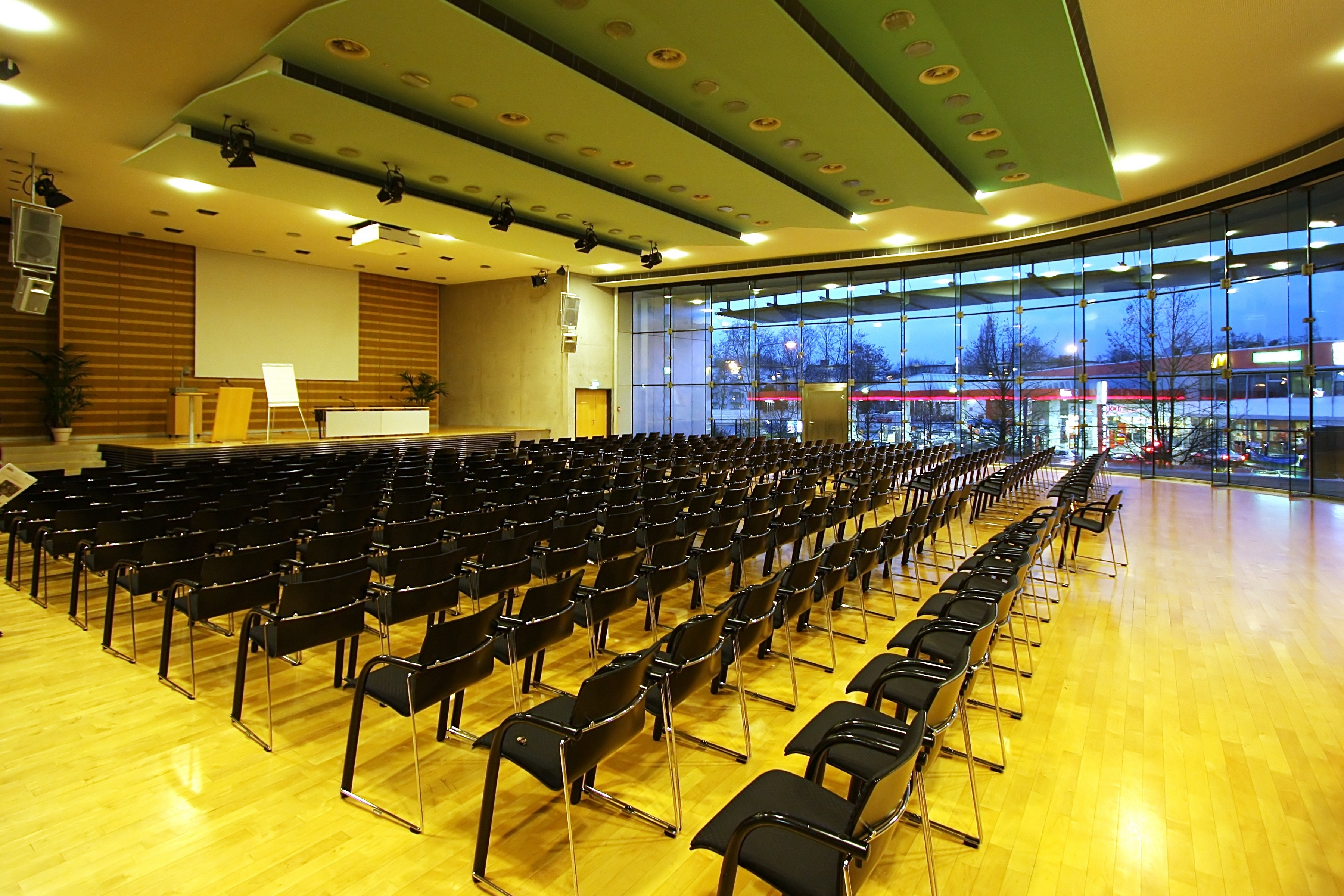 Deutsche Nationalbibliothek Frankfurt am Main: Veranstaltungssaal